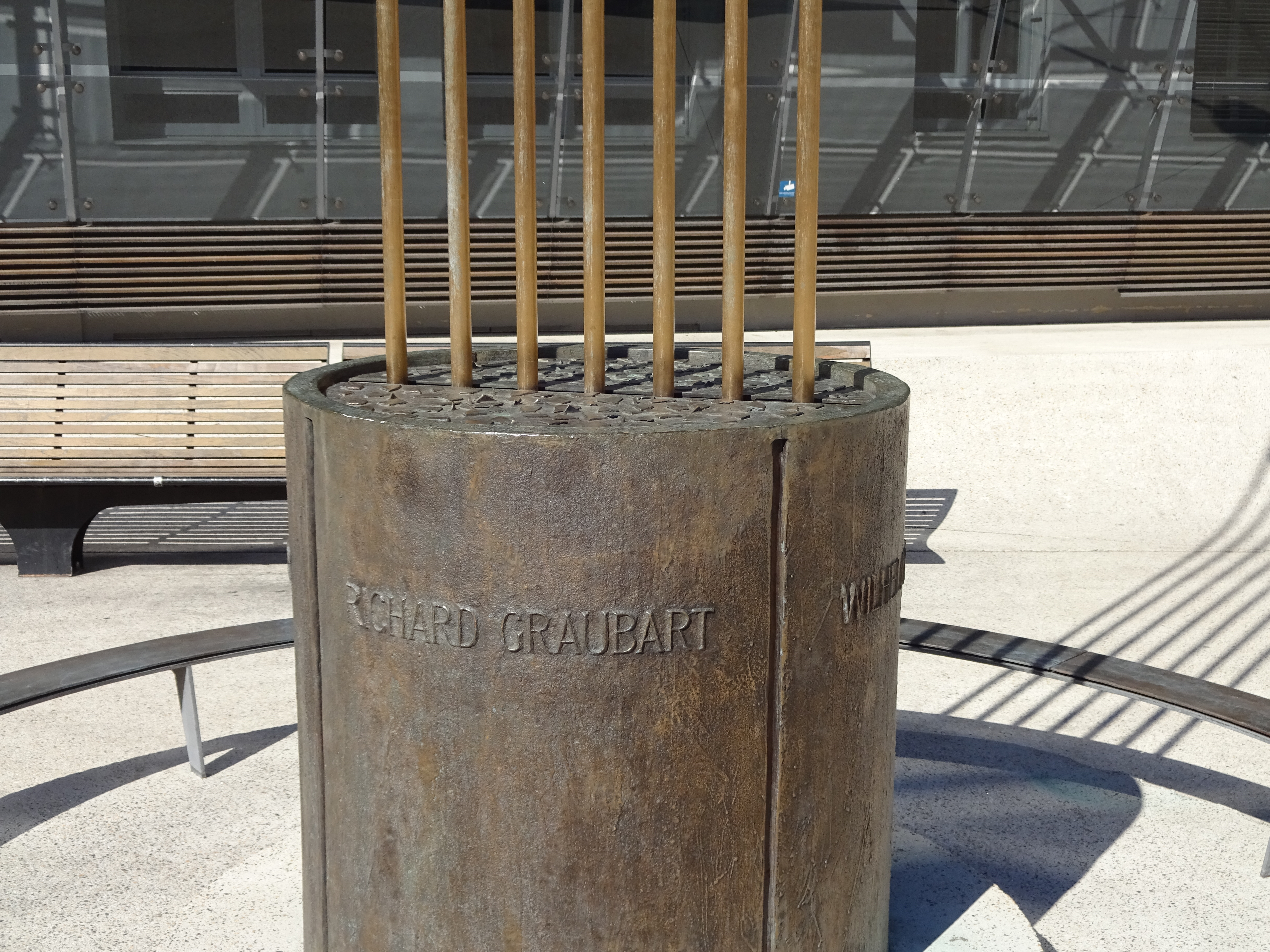 Pogromdenkmal am Landhausplatz, Innsbruck (Detail) This media shows the remarkable cultural object in the Austrian state of Tyrol listed by the Tyrolean Art Cadastre with the ID 14969. (on tirisMaps, pdf, more images on Commons, Wikidata)